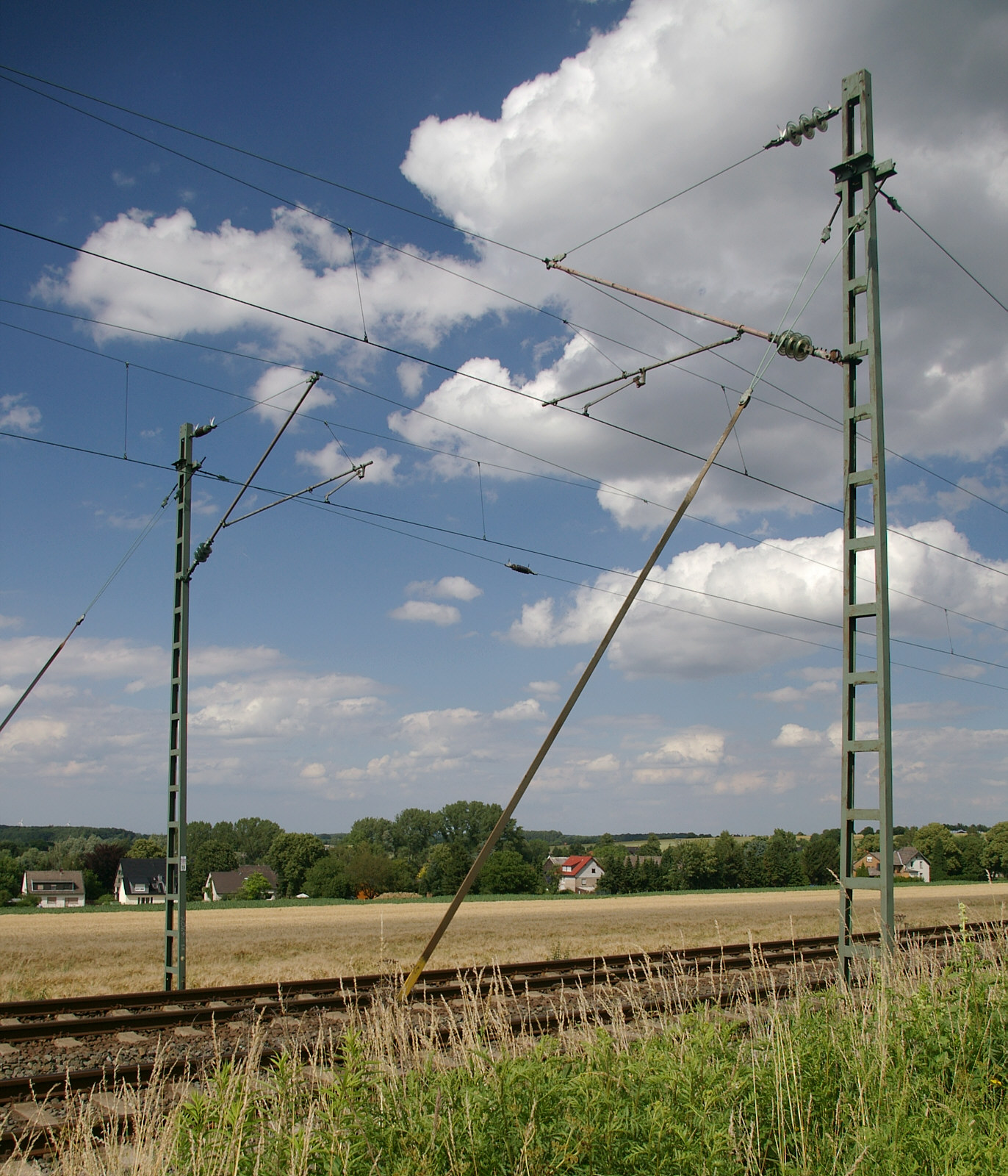 Abspannungen an einem Oberleitungsmast